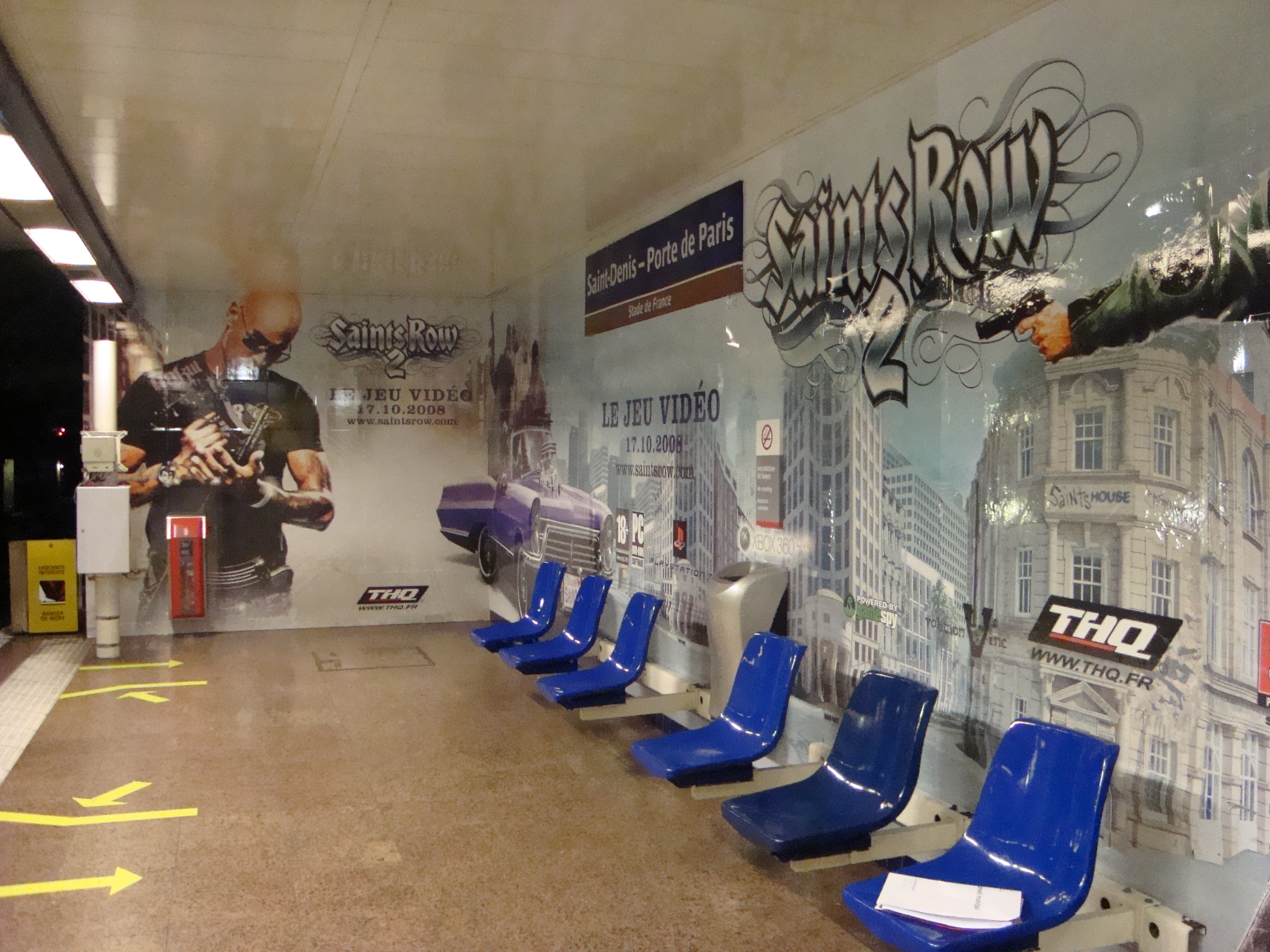 La station de métro Porte de Paris décorée par la campagne publicitaire pour le jeu vidéo Saints Row 2.